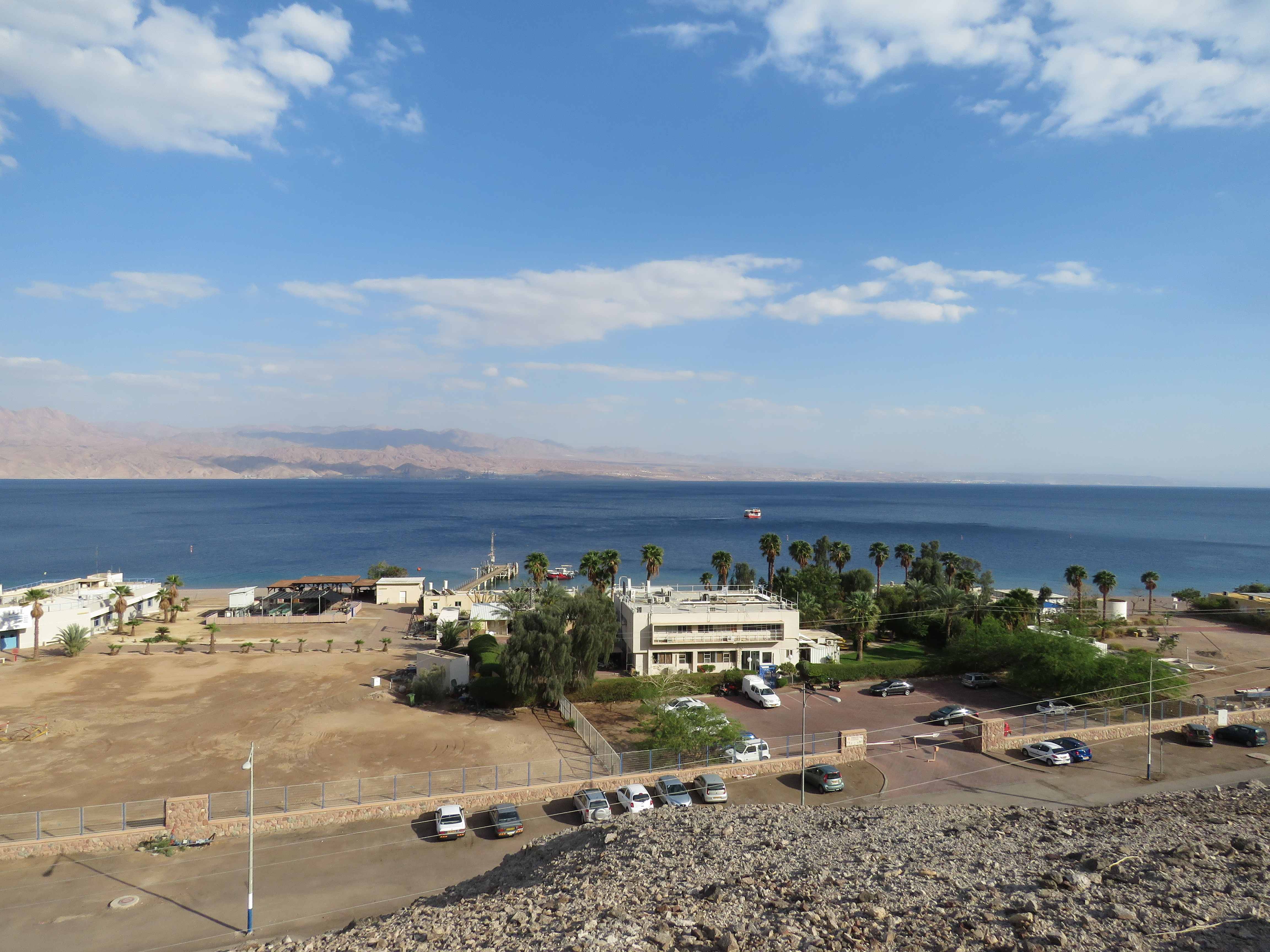 המכון הבינאוניברסיטאי למדעי הים באילת 2016